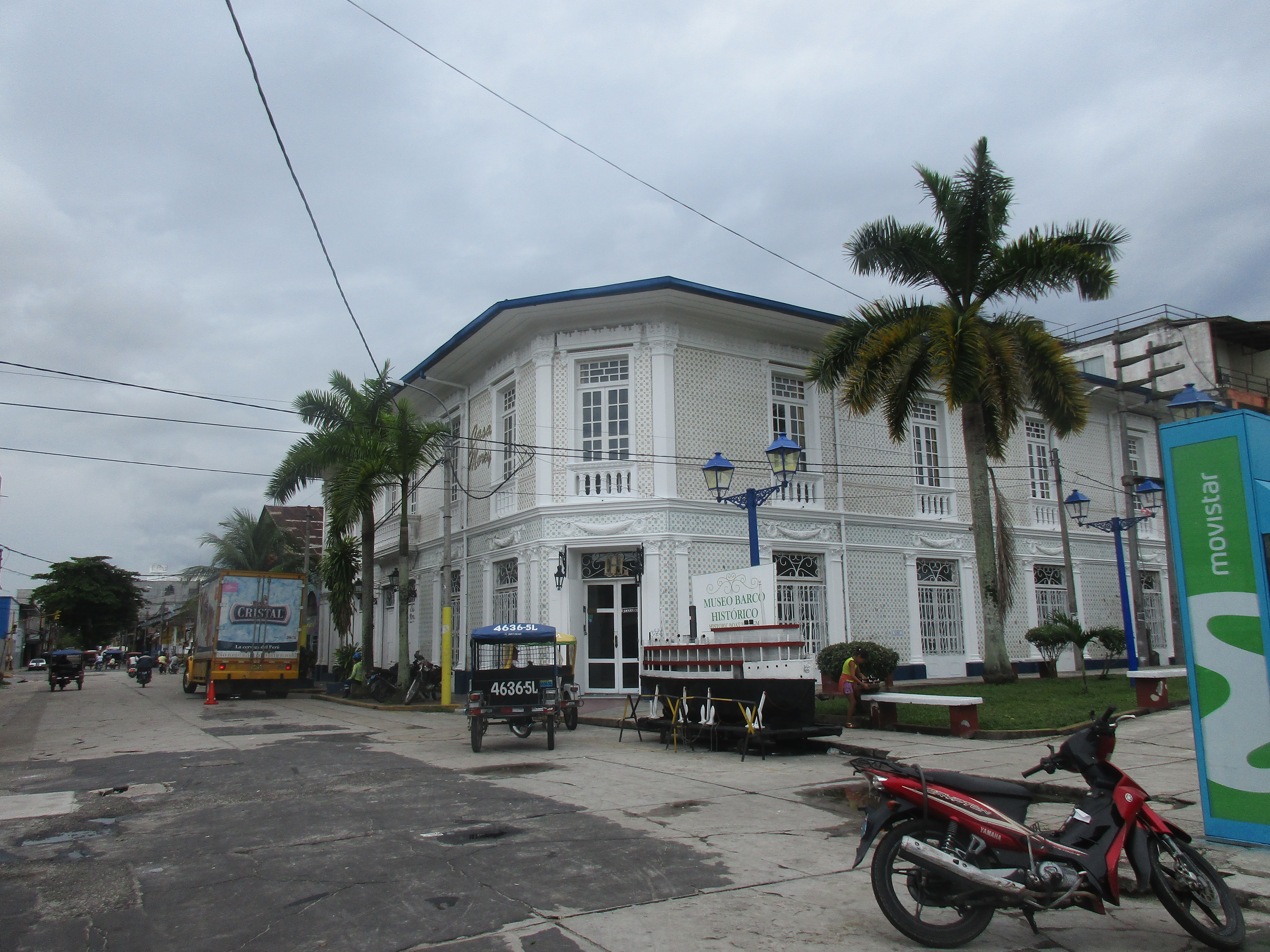 Panorama de la Casa Morey